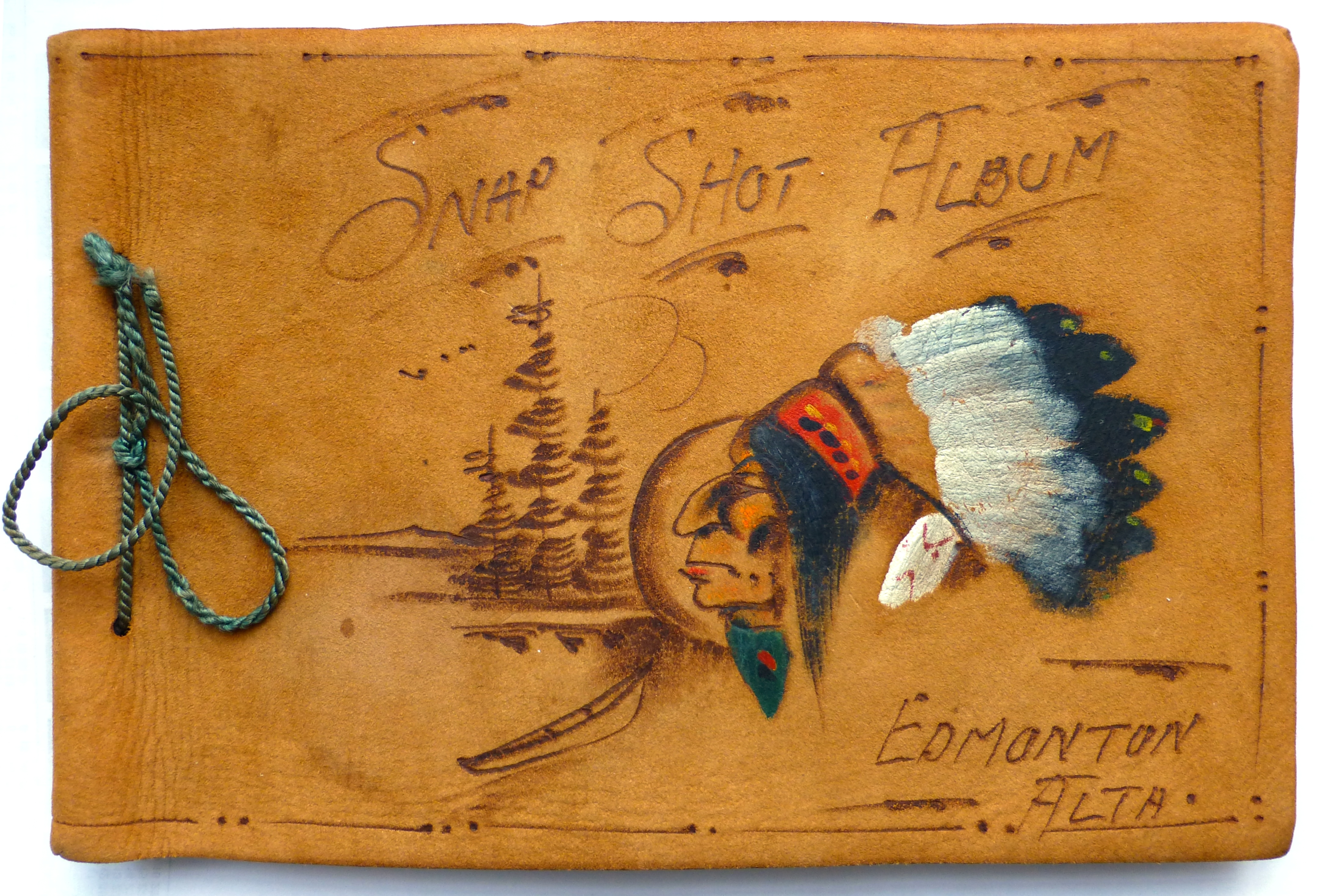 Hinsche Album 2 High Qu.